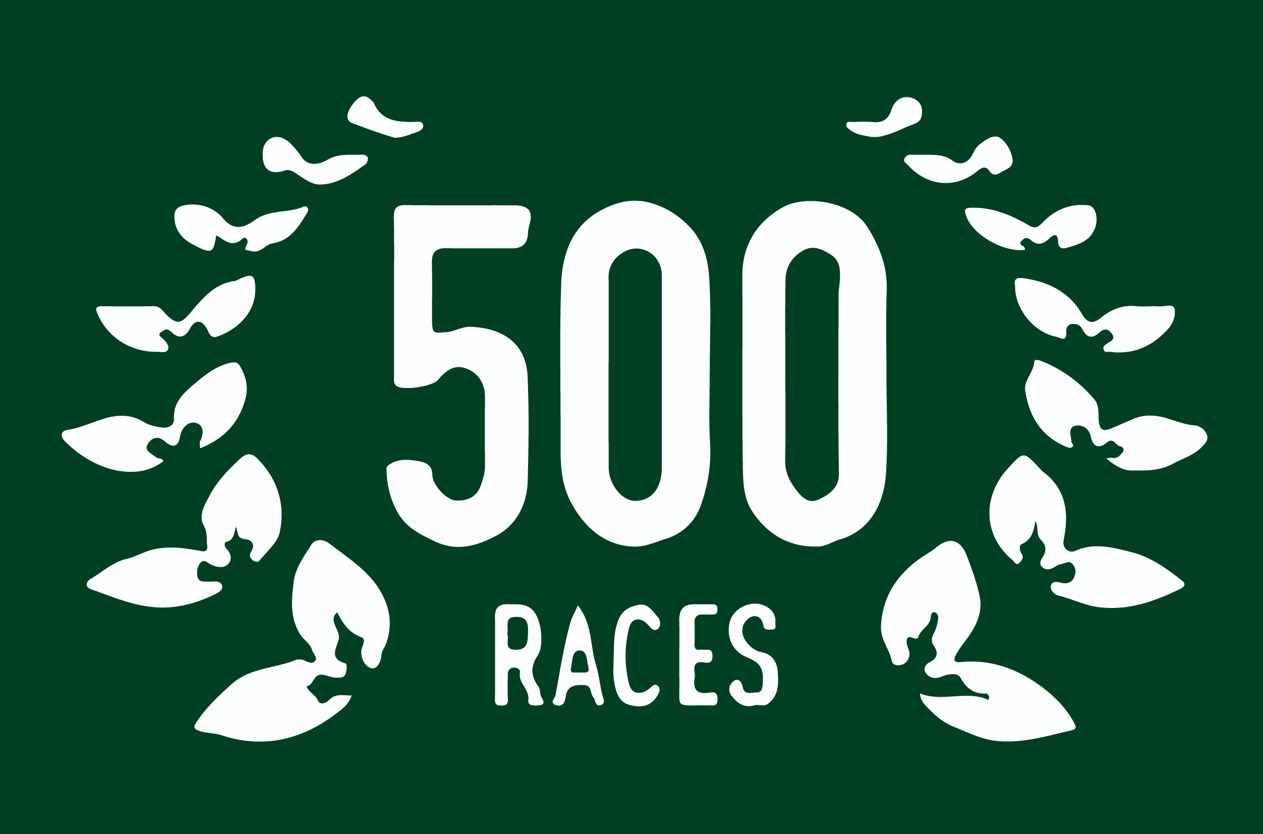 Logo abstracto de las 500 carreras festejadas por Team Lotus, en el Gran Premio de Europa de 2010